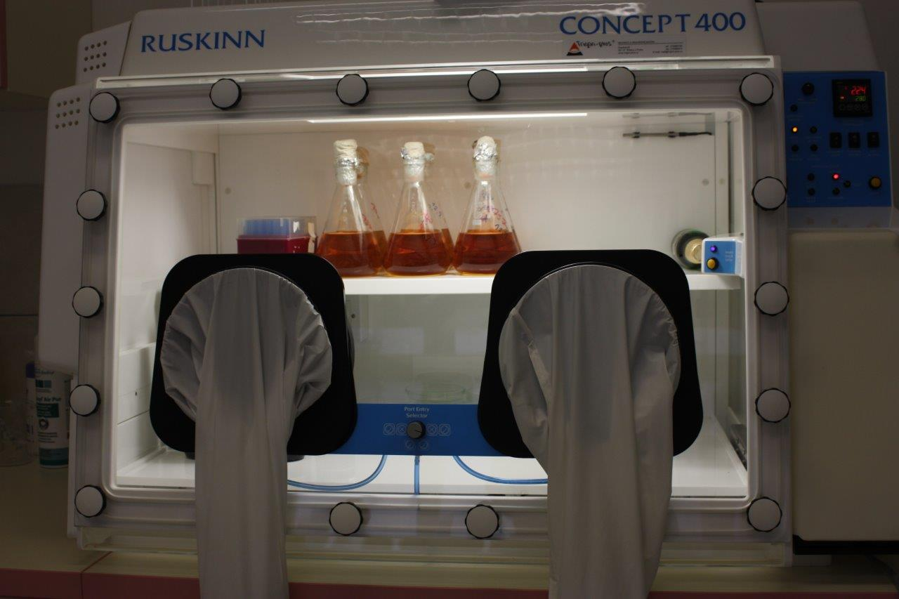 zařízení pro výzkum pivovarských kvasinek